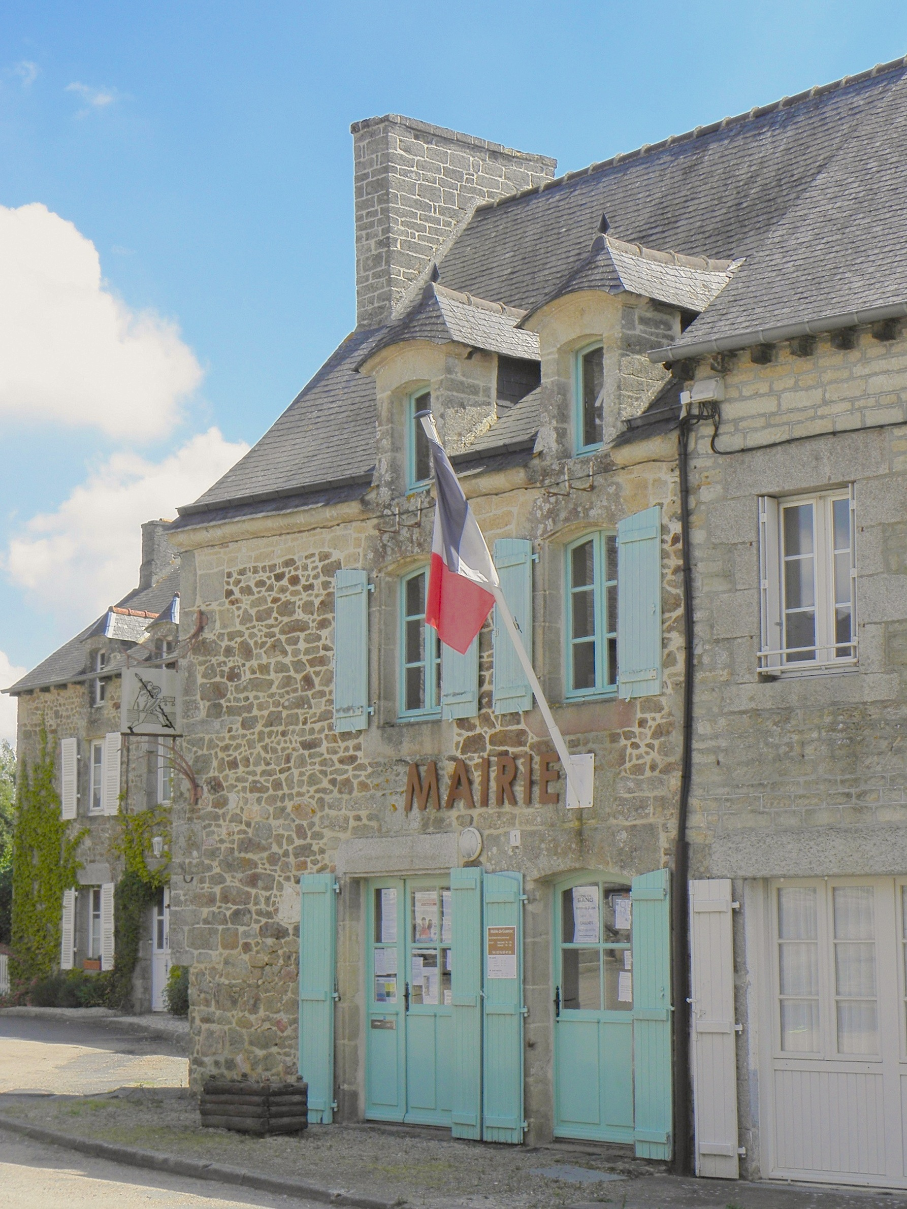 Mairie de Guenroc (22).